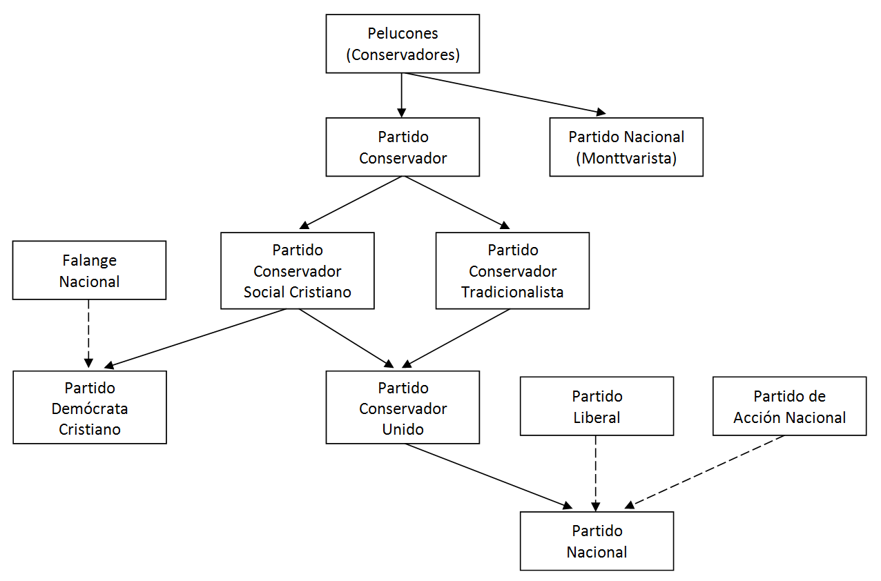 Esquema que muestra las distintas divisiones que sufrió el Partido Conservador chileno durante su historia. En línea punteada aparecen los partidos que se aliaron con algún partido de ideología conservadora pero que no poseían dicha doctrina política.